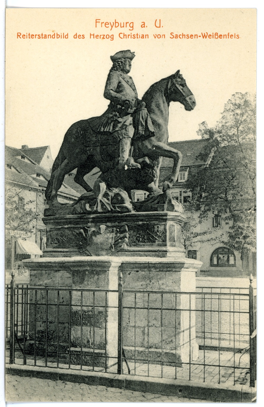 Freyburg; Reiterstandbild des Herzog Christian von Sachsen This postcard is from publisher Brück & Sohn in Meißen ( postcard has a unique number 16464 and is available in a higher resolution at the publisher. This images was uploaded in a cooperation project between Wikipedians and the publisher.